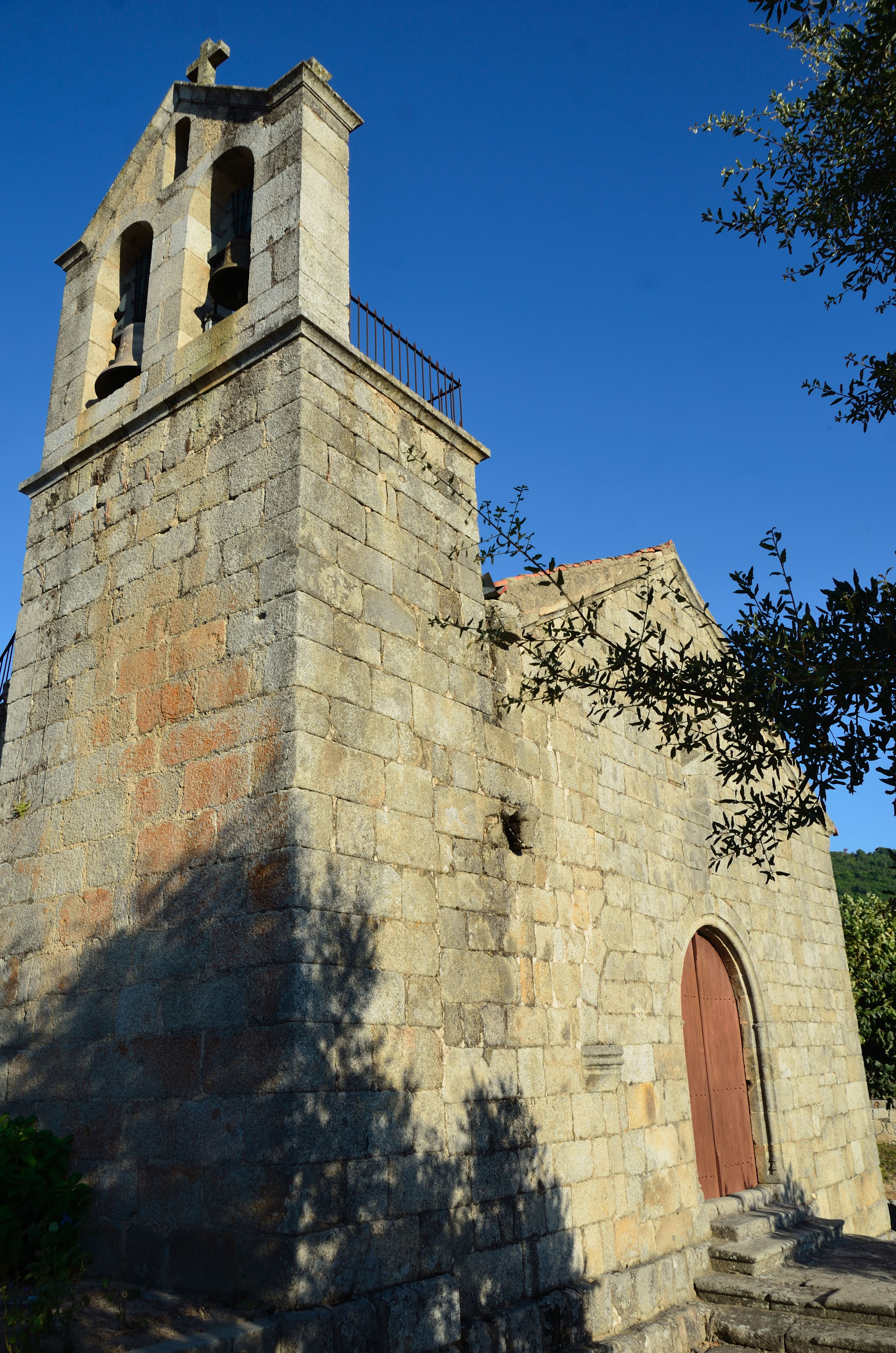 Detalhe da torre do sino